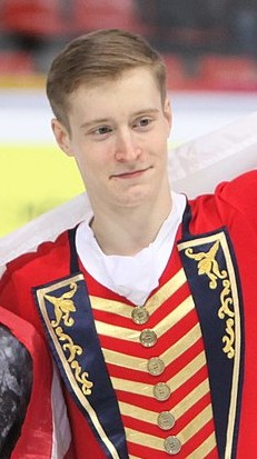 2018年フランス国際大会（フィギュアスケートの国際大会）男子シングル表彰台の写真から、Alexander Samarin選手部分をトリミングしたもの（撮影者：Rama氏）